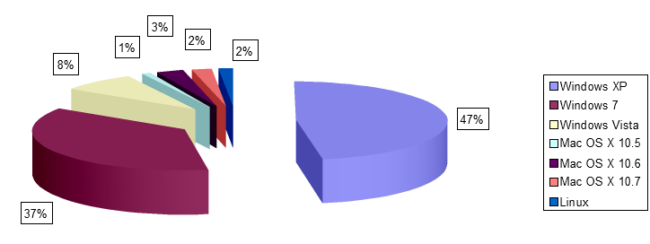 Ranking de sistemas operativos de escritorio por versiones a enero 2012. Varias fuentes.